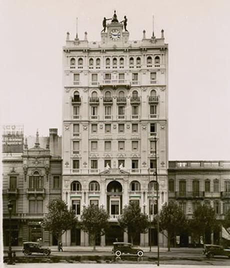 Edificio del Instituto Biológico Argentino, actualmente destinado a Auditoría General de la Nación. Frente a la Plaza del Congreso. Dirección: Avenida Rivadavia 1745 Arquitecto: Atilio Locatti Estilo: Veneciano Año: 1927 Buenos Aires, Argentina.